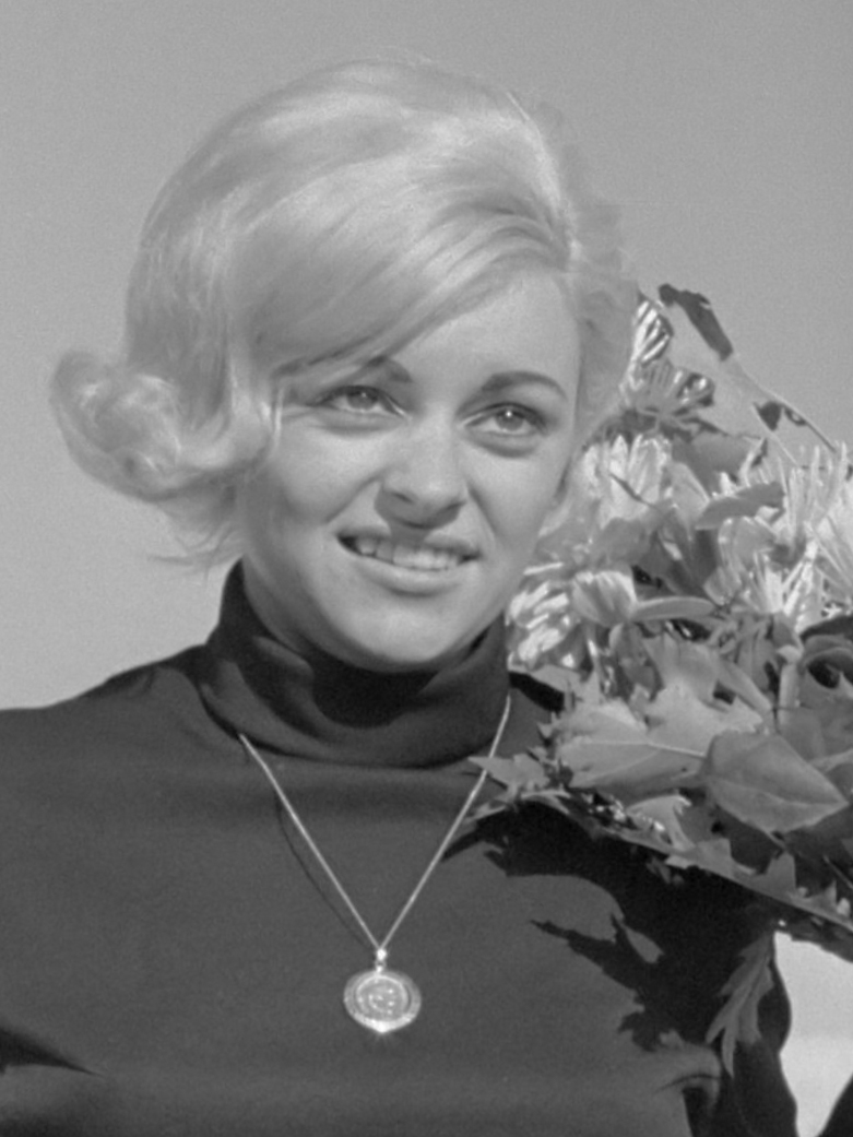 Corry en de Rekels en Wilma krijgen gouden plaat op schip op het Flevomeer; Corry Konings en Wilma met plaat